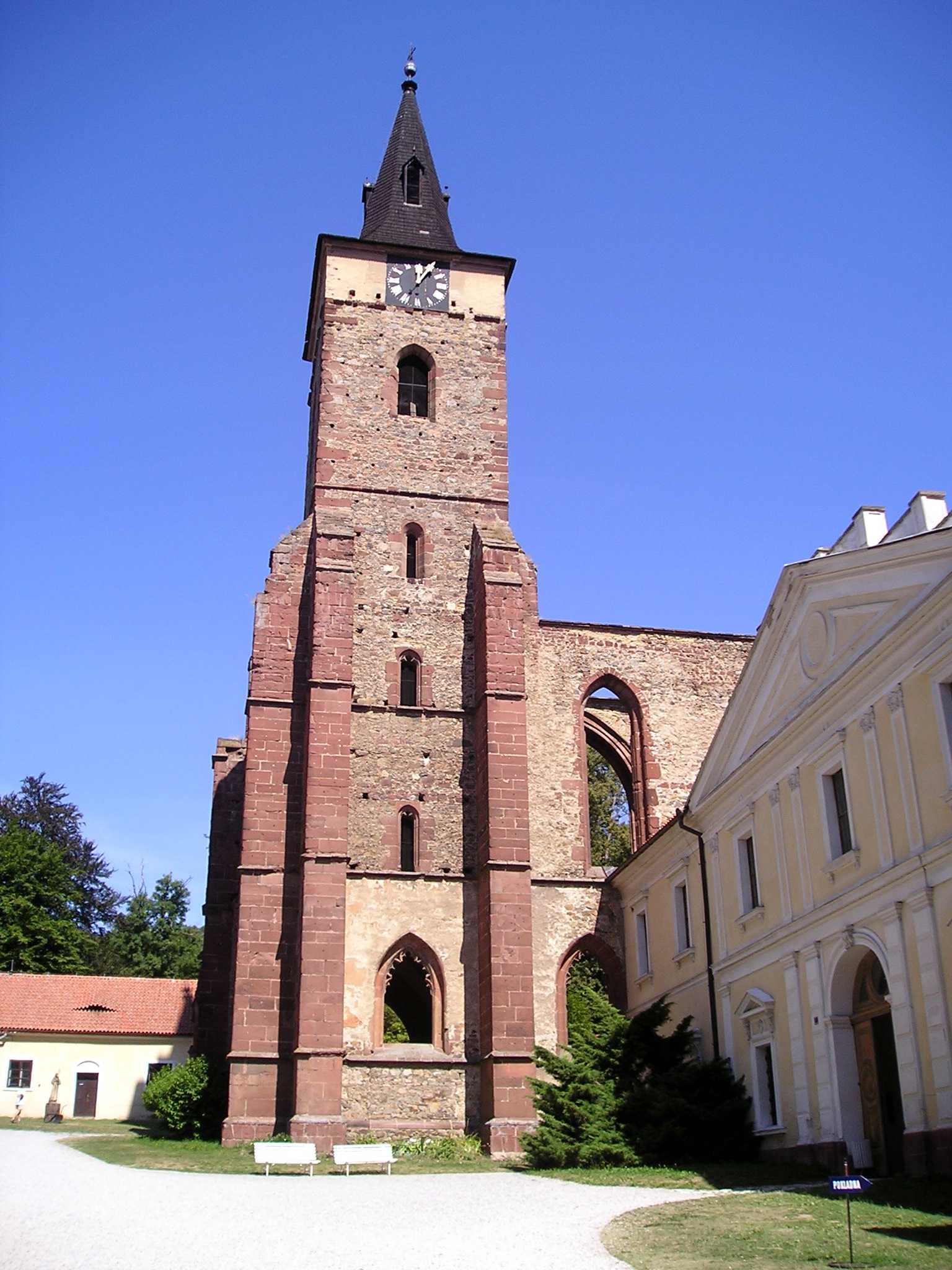 cože to jsem byl já